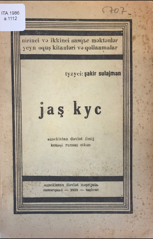 Sovyetler zamanında sosyalist ideolojiyi yerleştirmek için mekteplerde okutulan Ortak Türk Latin Alfabesi ile basılmış Özbekçe bir kitabın kapağı.